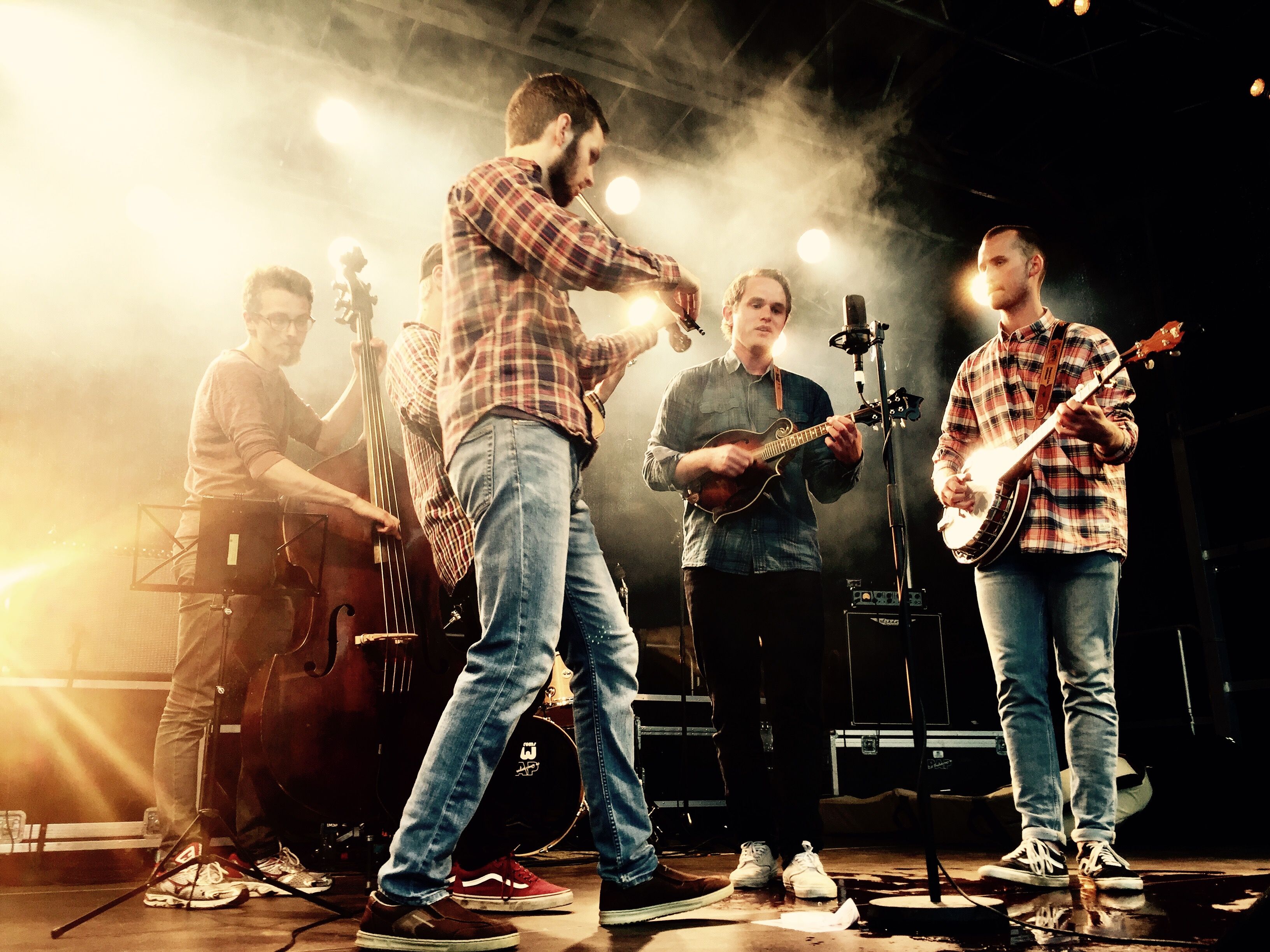 Strengeplukk på Funkisdagen 2016 i Stavanger